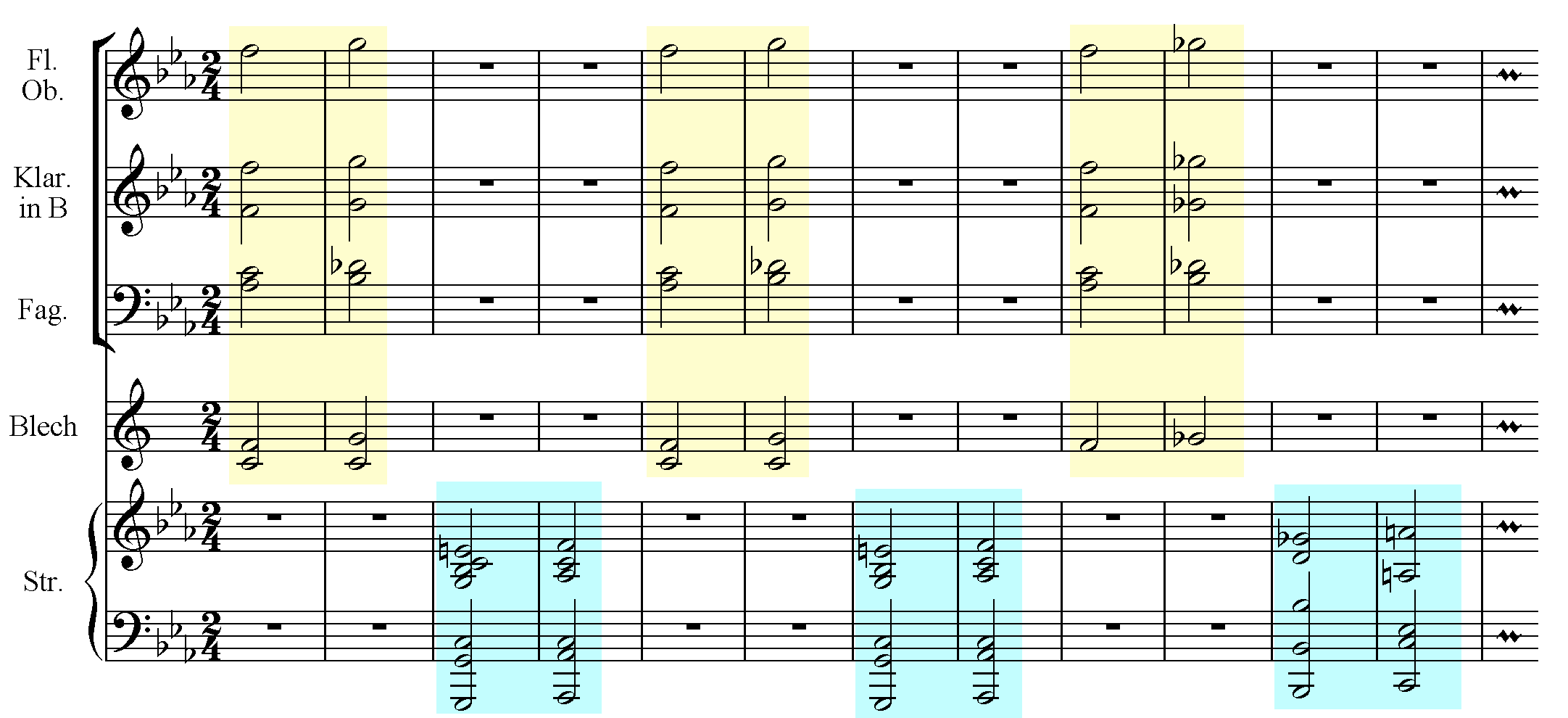 Bild:Fuenfte-Klangfläche.png